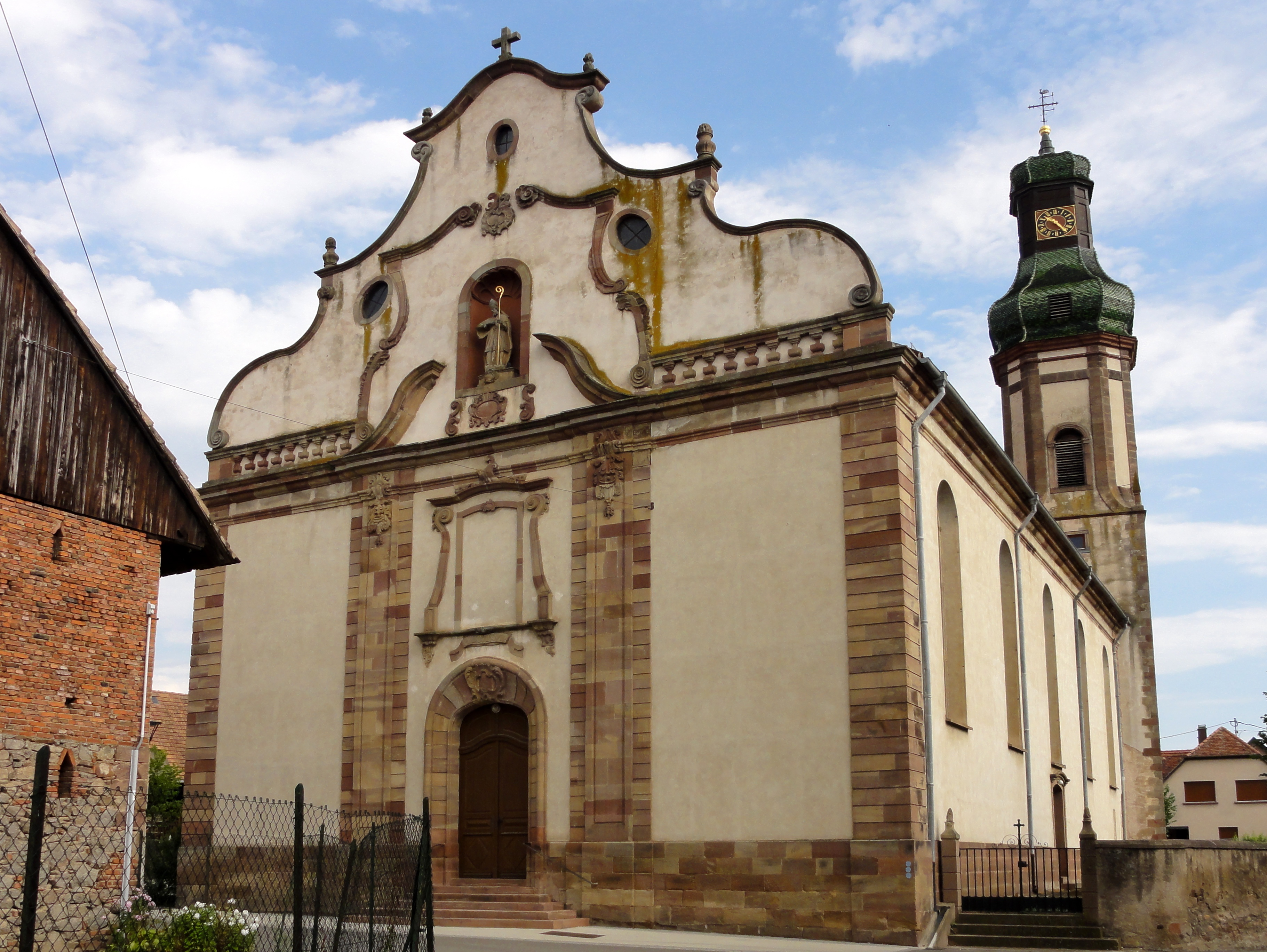 Alsace, Bas-Rhin, Église Saint-Martin d'Ebersheim (PA00084700, IA00124467).